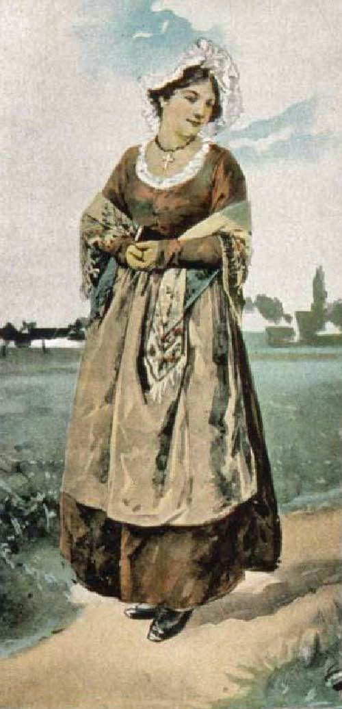 Costume de Grendelbruch (vers 1820). Bibliothèque nationale et universitaire de Strasbourg